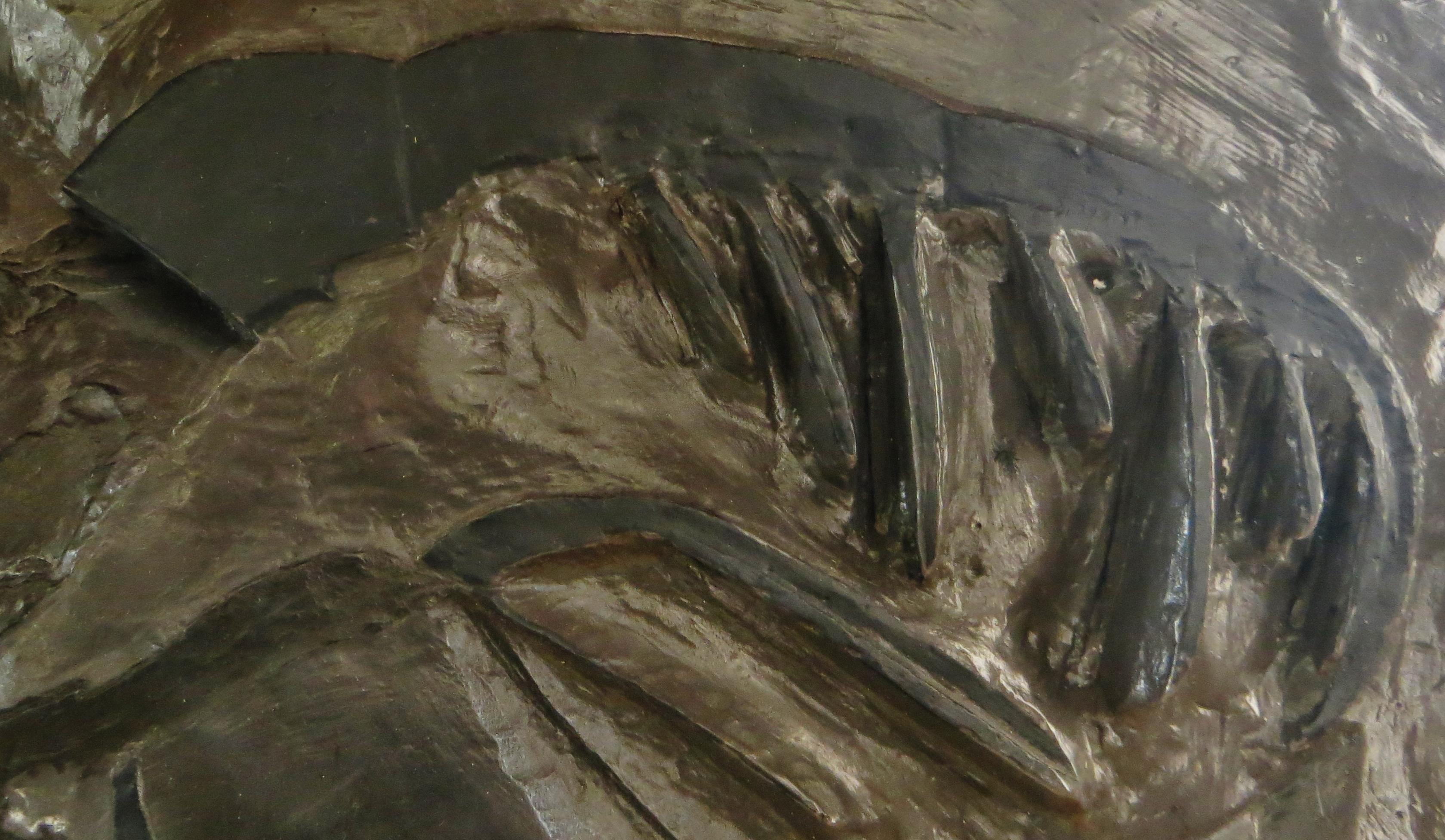 Fossil of eurypterid - Took the picture at Natural History Museum, Bonn University